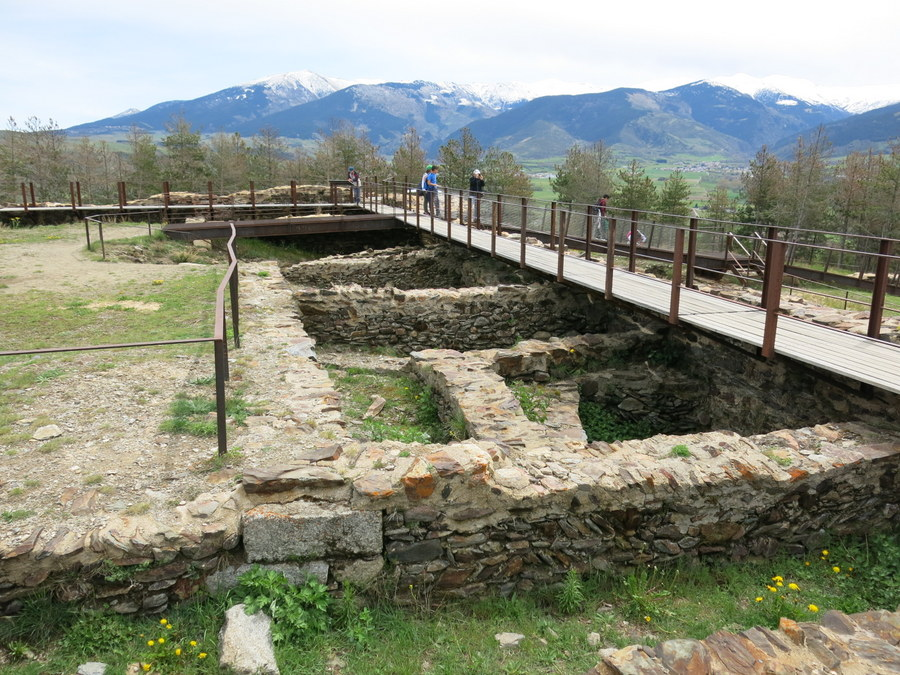 Castell de Llívia - Cerdanya